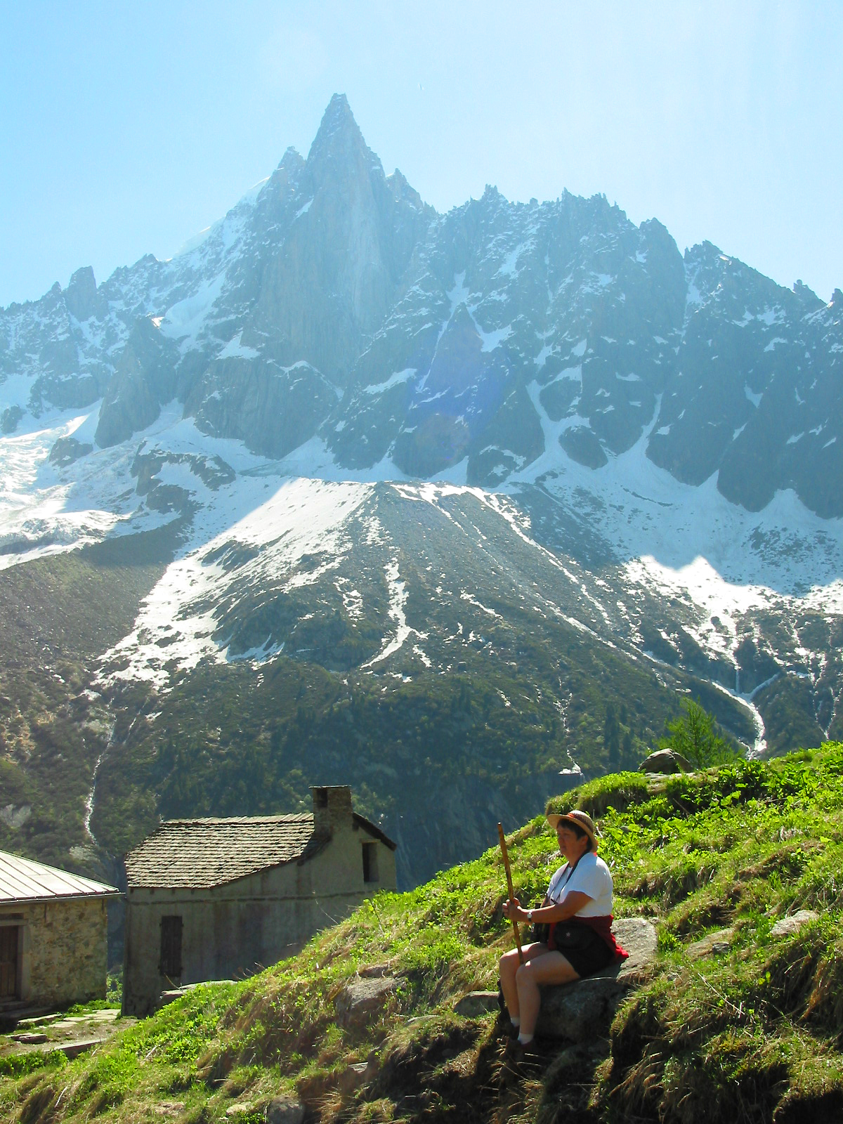 Chamonix-Mont-Blanc (Haute-Savoie - France), Les Drus vus depuis le sentier surplomblant le Grand Hôtel du Montenvers (Aiguille du Grand Dru: 3754 m -Aiguille du Petit Dru: 3733 m.